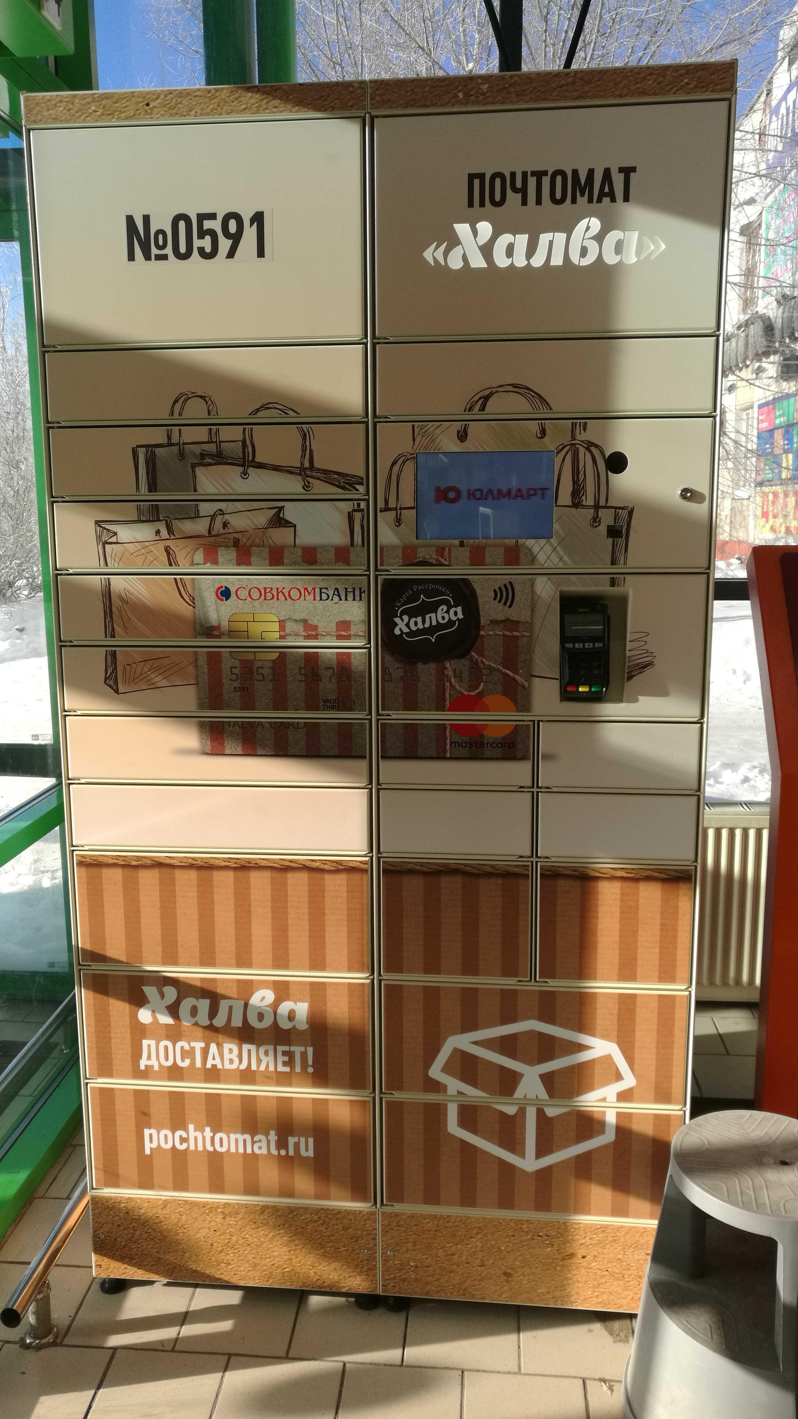 Deponejo de poŝtomendoj. Tjumeno, Rusio.